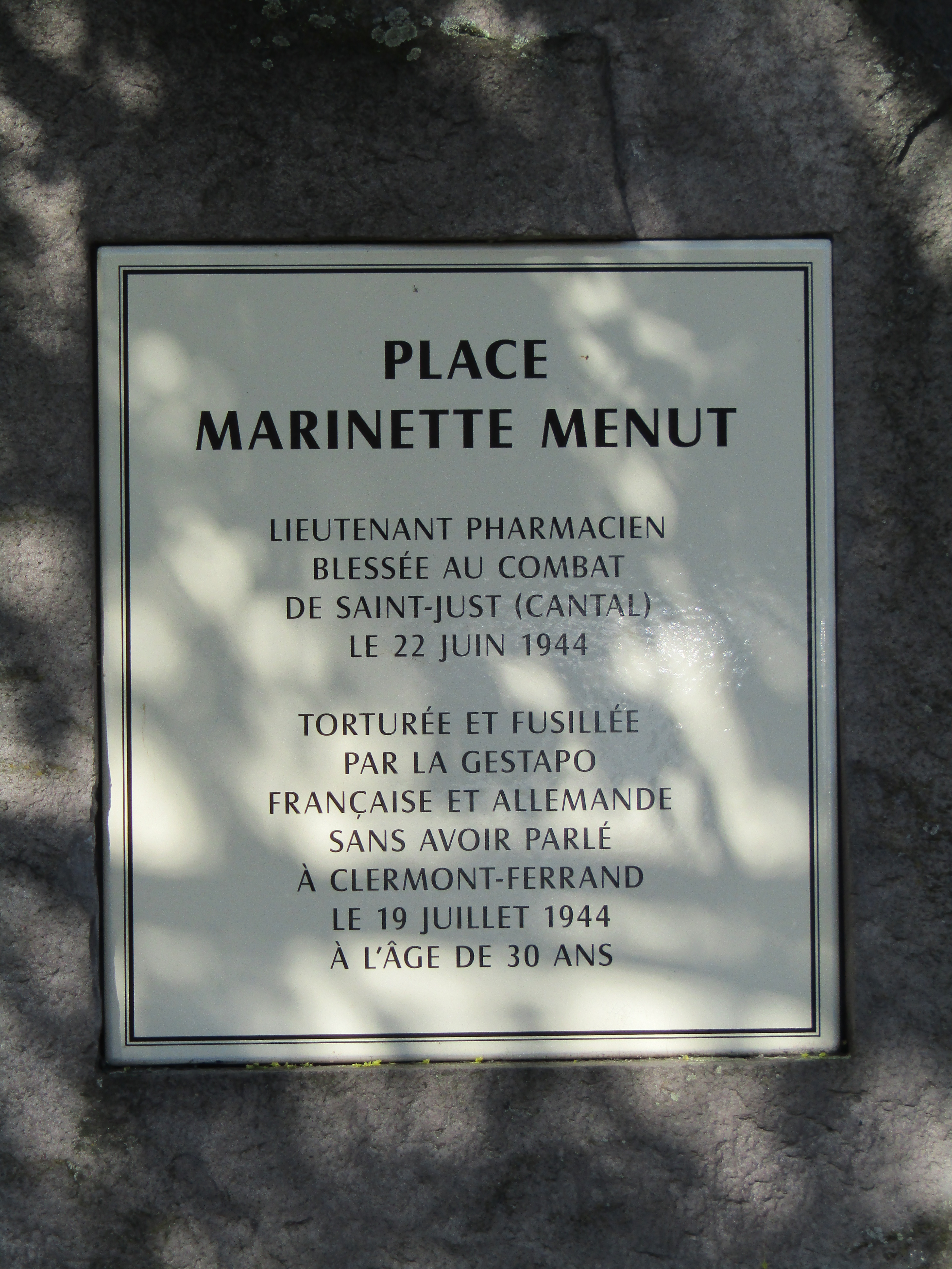 Place Marinette Menut lieutenant pharmacien, blessée au combat de Saint-Just (Cantal le 22 juin 1944). Torturée et fusillée par la Gestapo française et allemande sans avoir parlé à Clermont-Ferrand le 19 juillet 1944 à l'âge de 30 ans